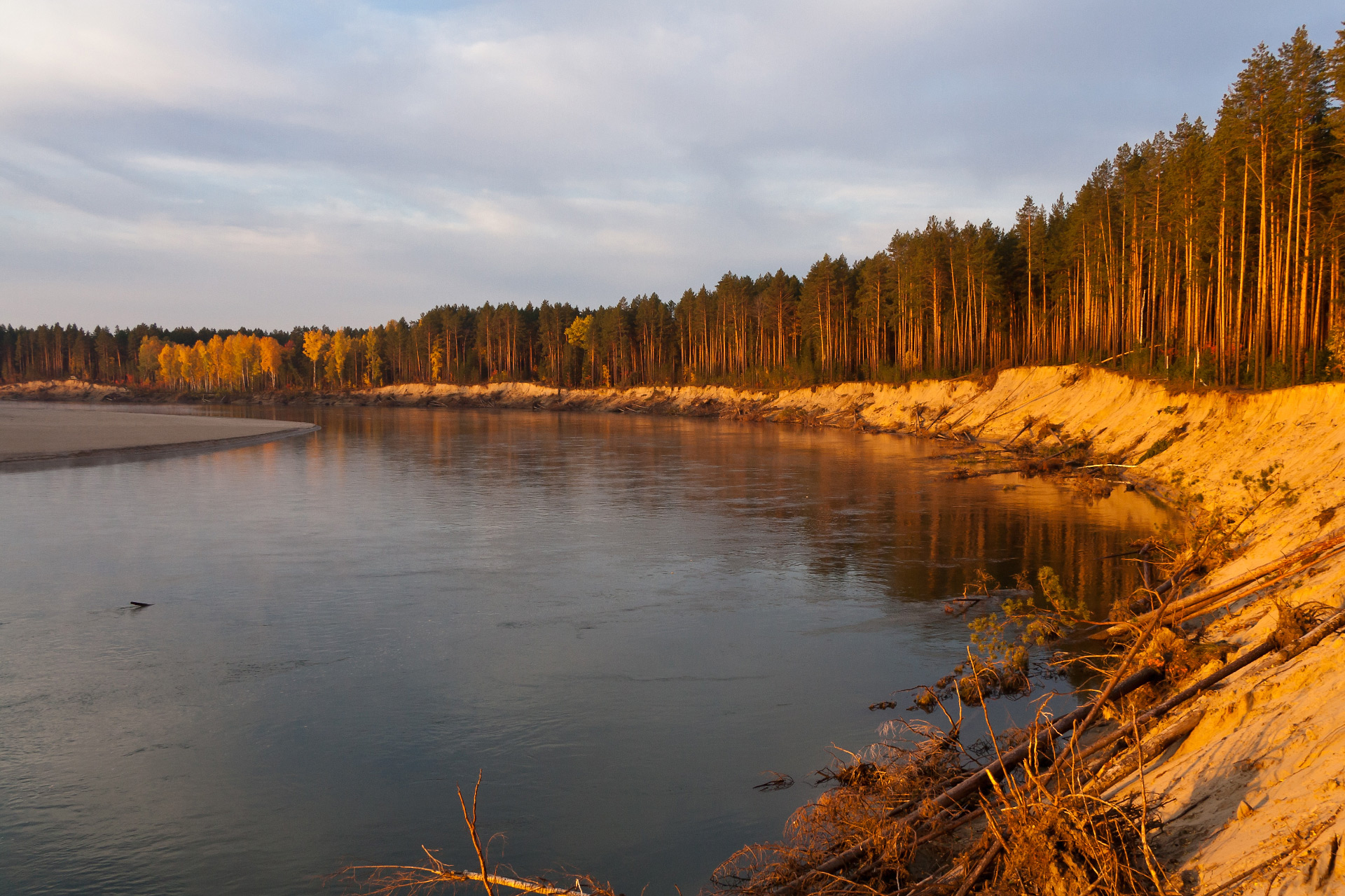 Симанский бор: Кожевниковский район, Томская область This image is related to the protected area of Russia number 7010067